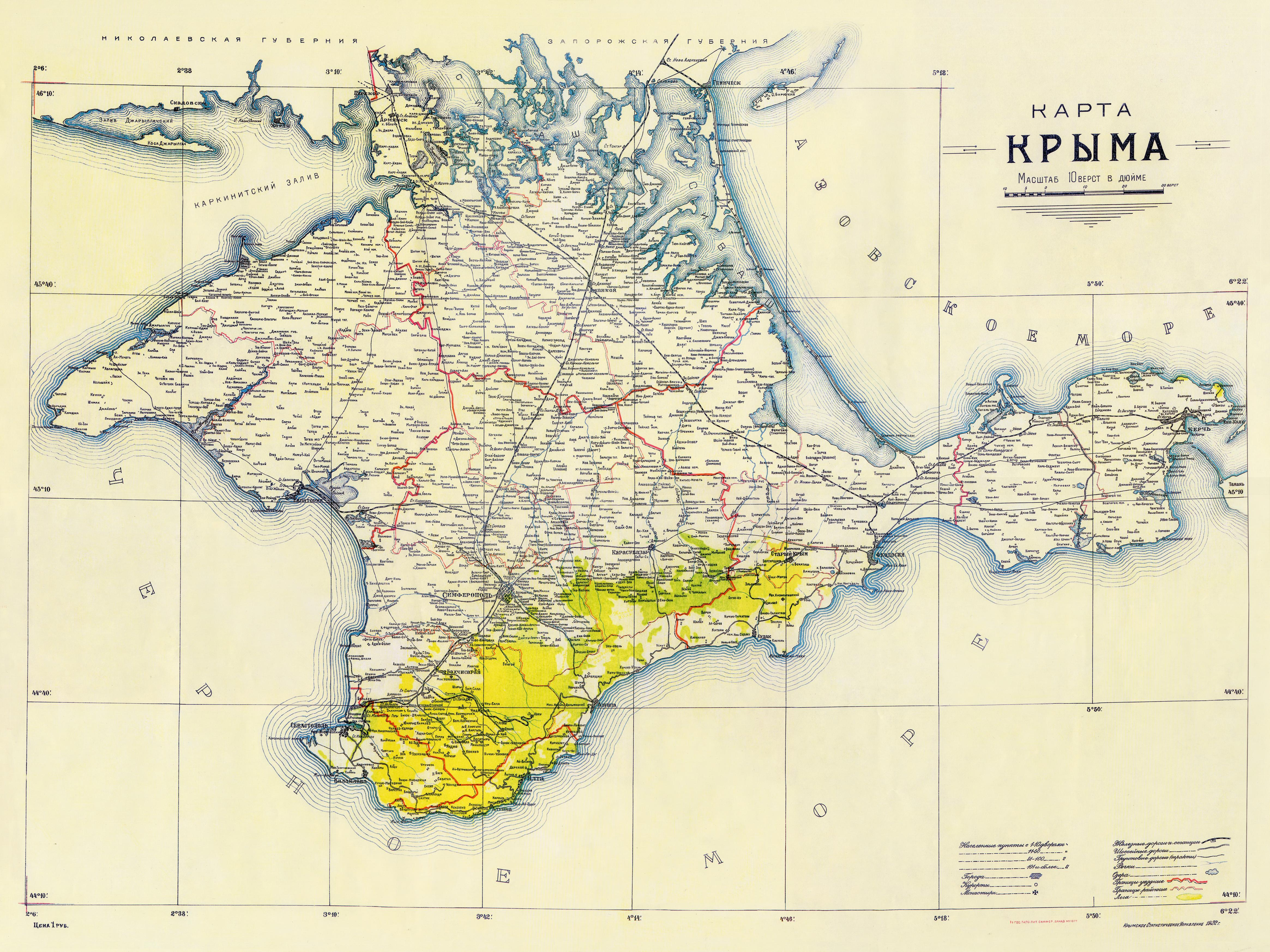 Карта Крымского статистического управления 1922 г.